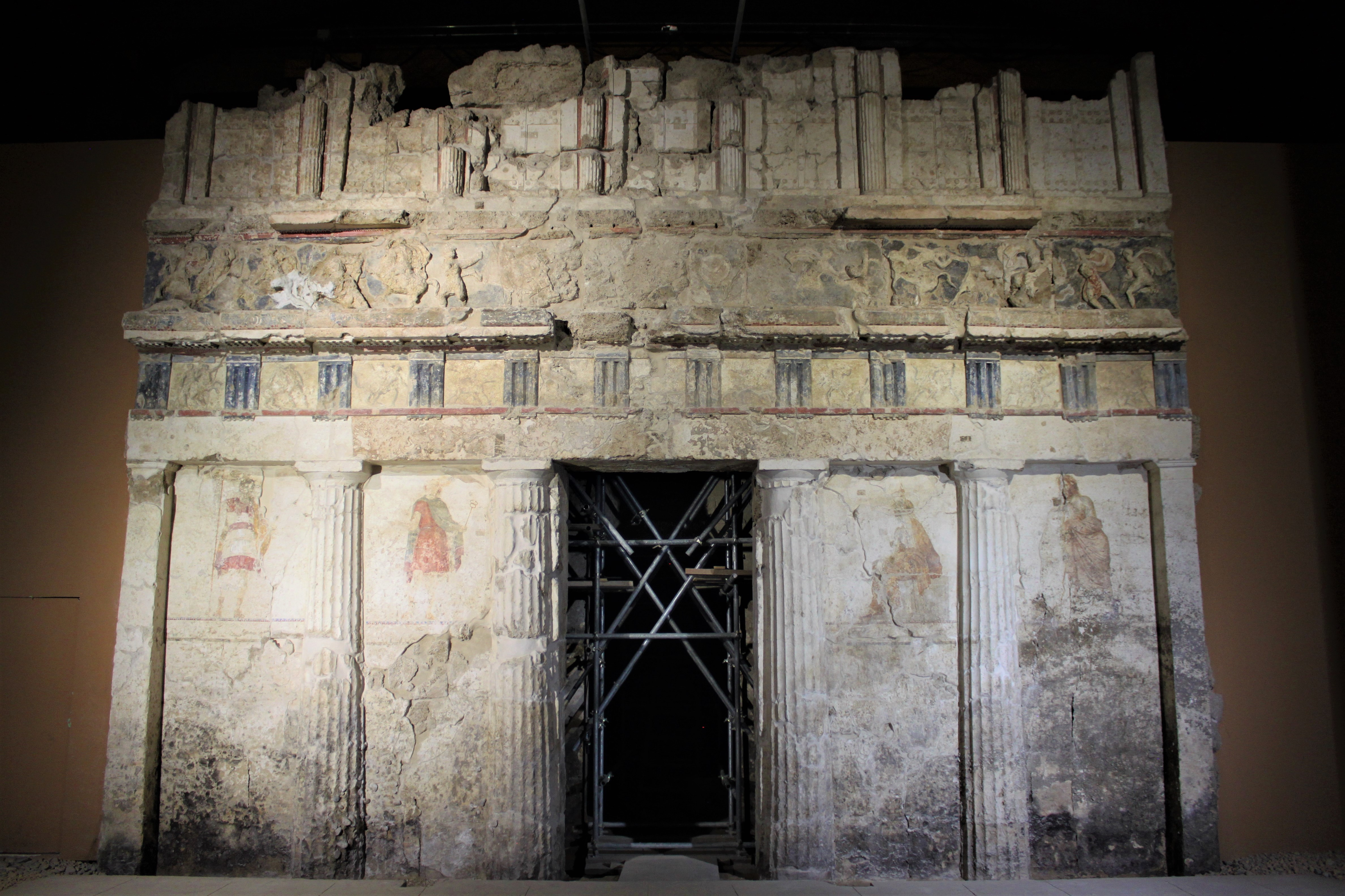 Façade de la tombe du jugement à Lefkadia (ancienne Mieza)